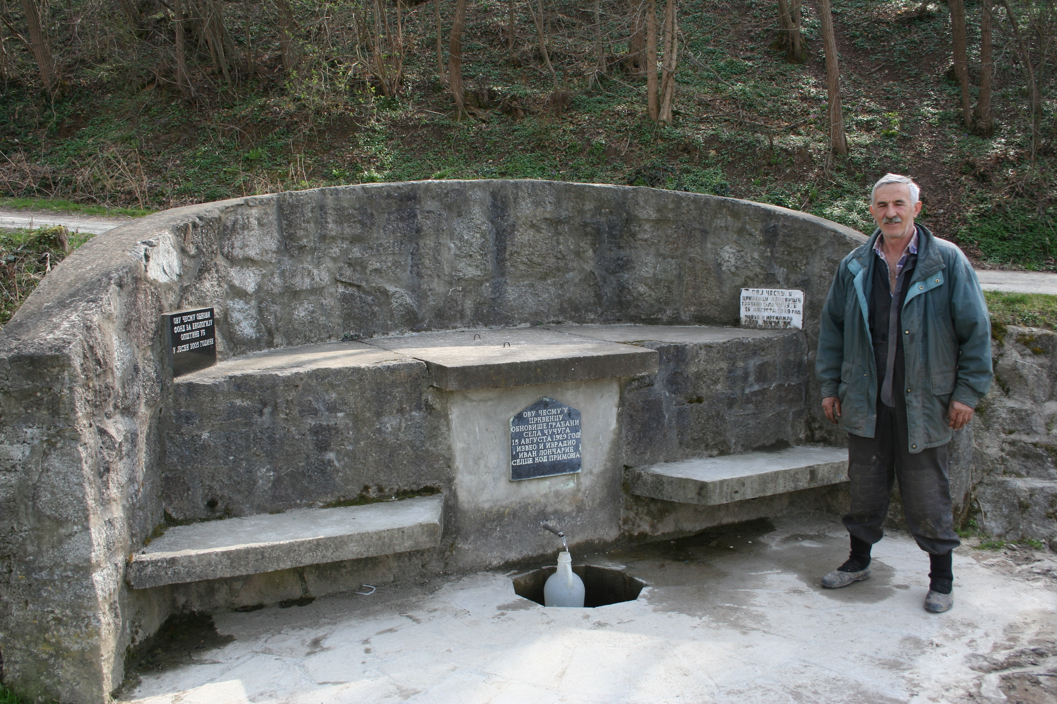 Česma u Crkvencu, Čučuge